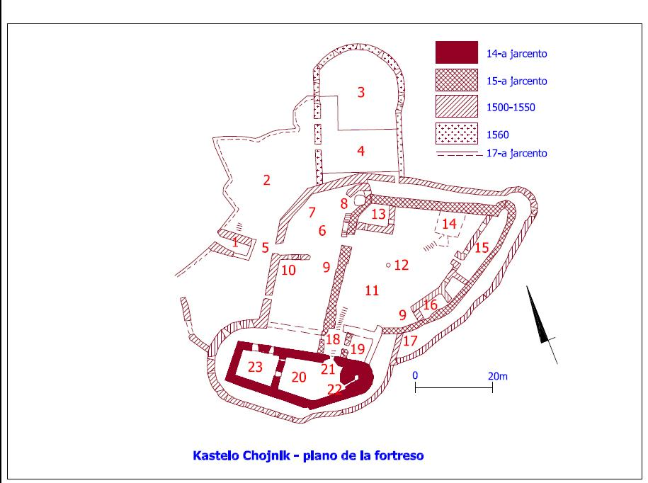 Plan zamku Chojnik. 1. Baszta bramna. 2. Bastion zewnętrzny. 3. Basteja północna. 4. Schronisko. 5. Główna brama wejściowa i most zwodzony. 6. Mały dziedziniec (gospodarczy). 7. Mieszkanie komendanta zamku. 8. Wieża i loch głodowy. 9. Cysterny z wodą. 10. Stajnia. 11. Główny dziedziniec zamkowy (dolny). 12. Pręgierz. 13. Sala sądowa. 14. Piwnica. 15. Mieszkanie załogi. 16. Kuchnia. 17. Międzymurze. 18. Brama do zamku górnego. 19. Arsenał. 20. Dziedziniec pałacowy. 21. Kaplica. 22. Obronna wieża zamkowa (stołb). 23. Zamkowy budynek mieszkalny (pałac).